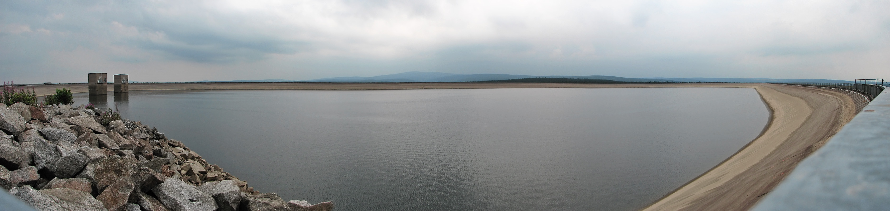 Beschreibung: Pumpspeicherwerk Markersbach - Panorama vom Oberbecken Fotograf: Darkone, 2. August 2005